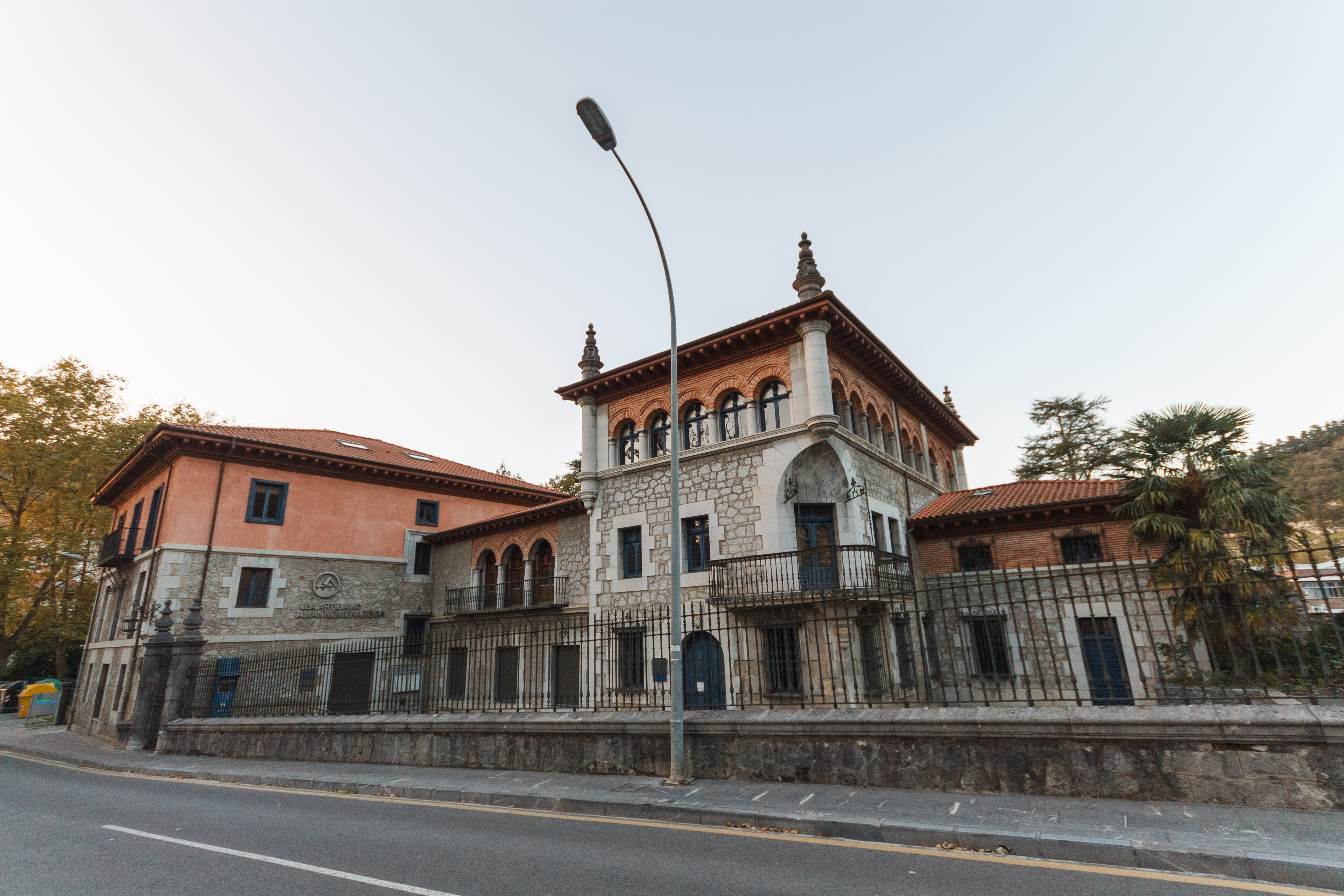 Villa Gaytan de Ayala